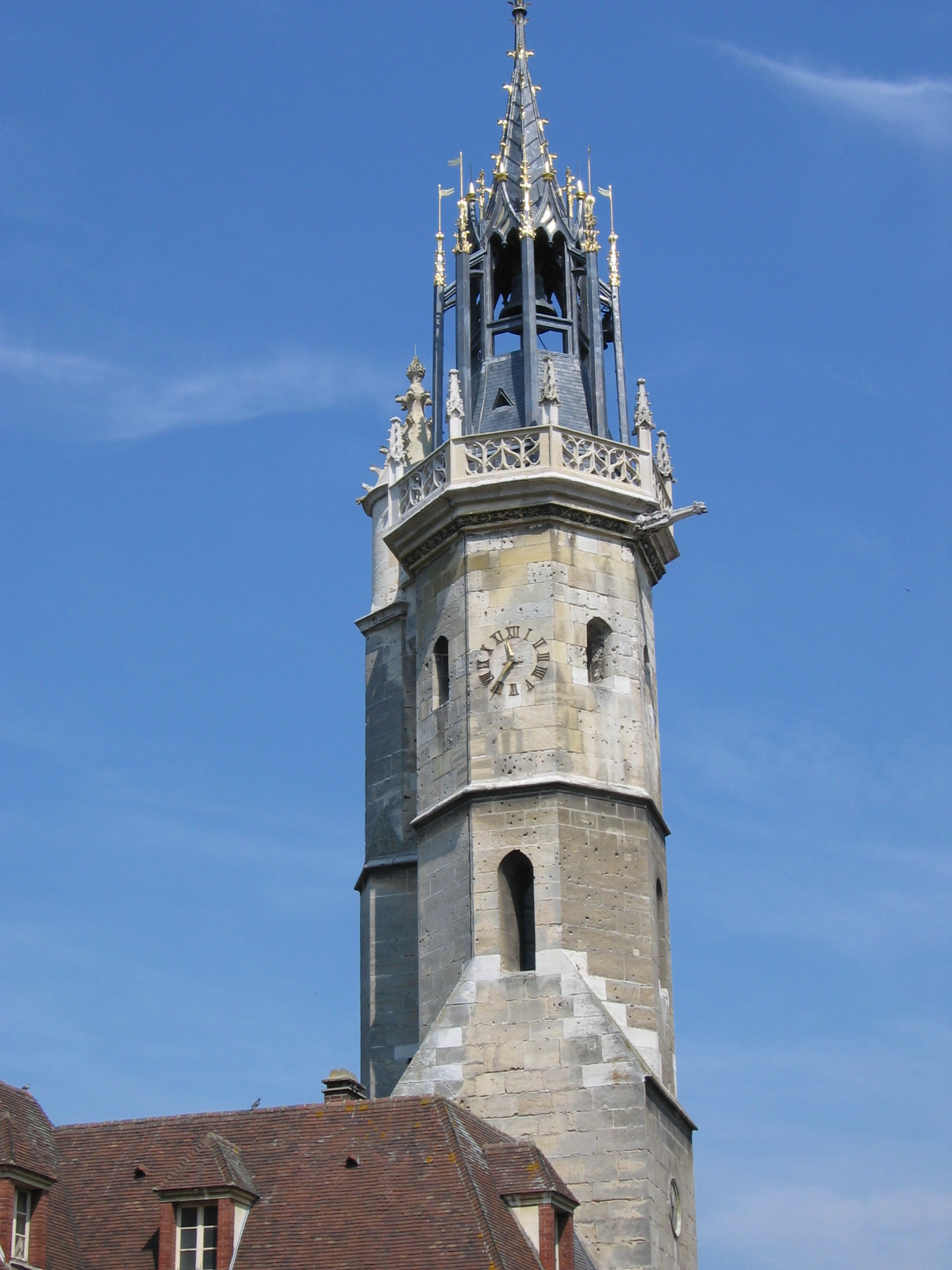 Eglise Saint-Taurin, intérieur de la nef, Évreux (Eure)